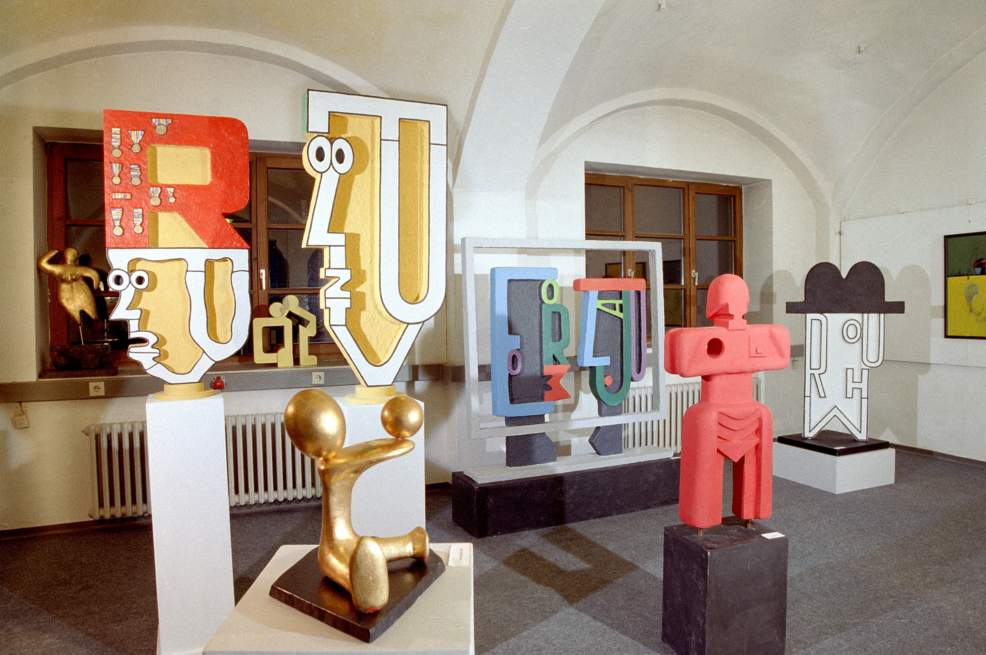 Beispiele für den Typoismus (v.links): Revolution-Evolution; Romeo und Julia; Mr. Humor Plastik im Vordergrund: Spielendes Kind; Amazone